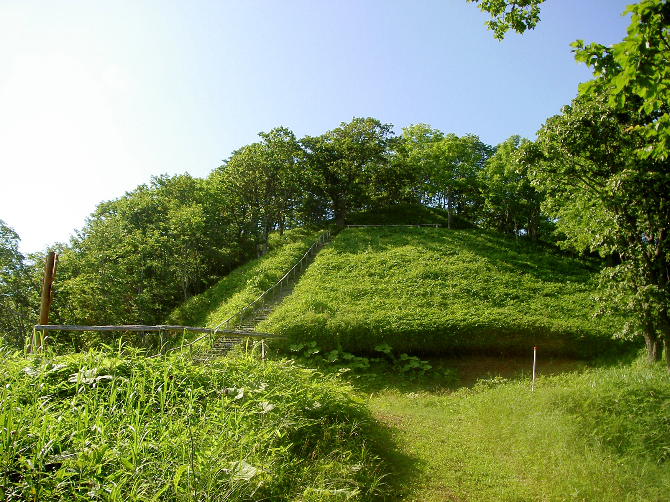 埋蔵文化財に指定されているチャシの山﨑岬。投稿者により2006年7月山﨑山林にて撮影。 Yamazaki Chashi, Kushiro, Hokkaido, Japan